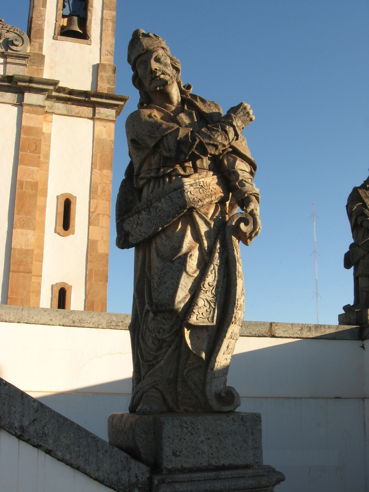 Profeta Ezequiel - Doze profetas de Aleijadinho Congonhas Minas Gerais